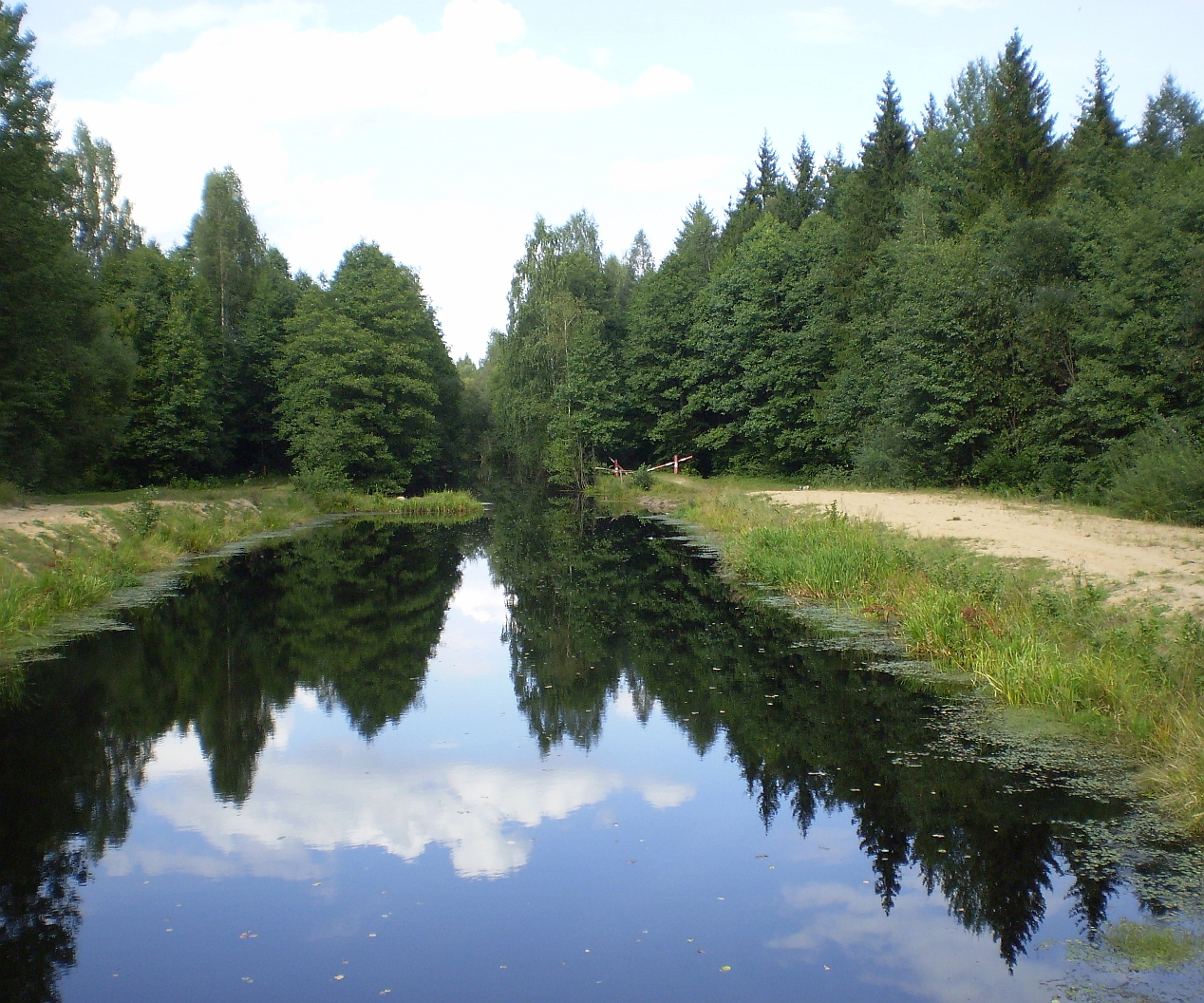 Сергучскі канал у Бярэзінскім біясферным запаведніку